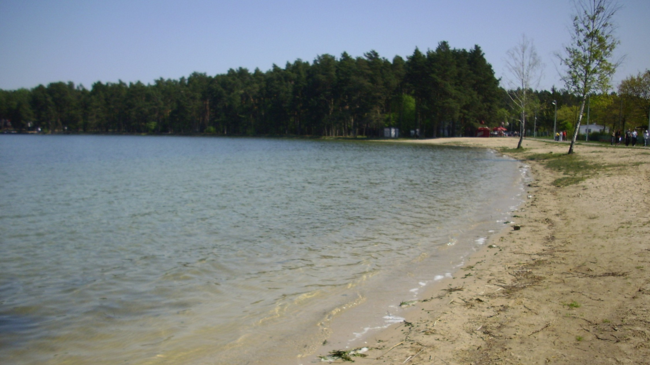 Jezioro Bialskie w gminie Dębowa Kłoda (pow. parczewski, woj. lubelskie).